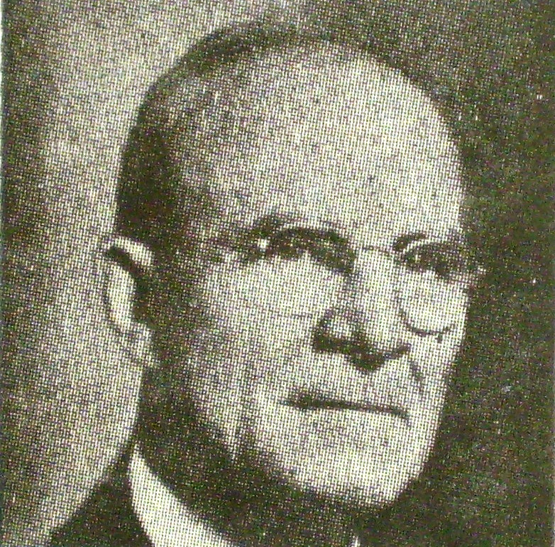 Casimir Funk, pionero de las vitaminas